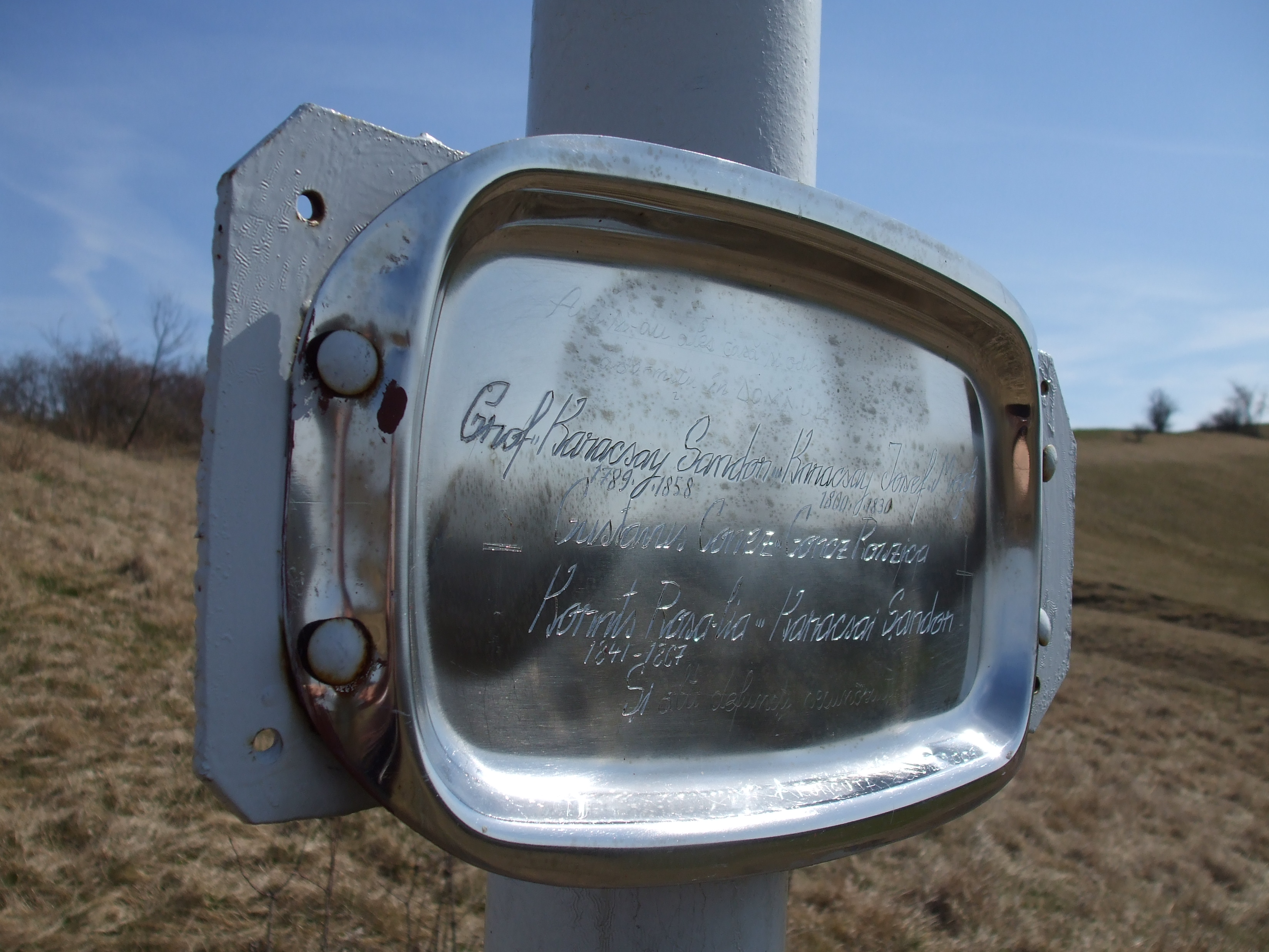 Gróf Karacsay Sándor (1789–1858) emlékjeleRomână: Imagini din Aruncuta,Cluj